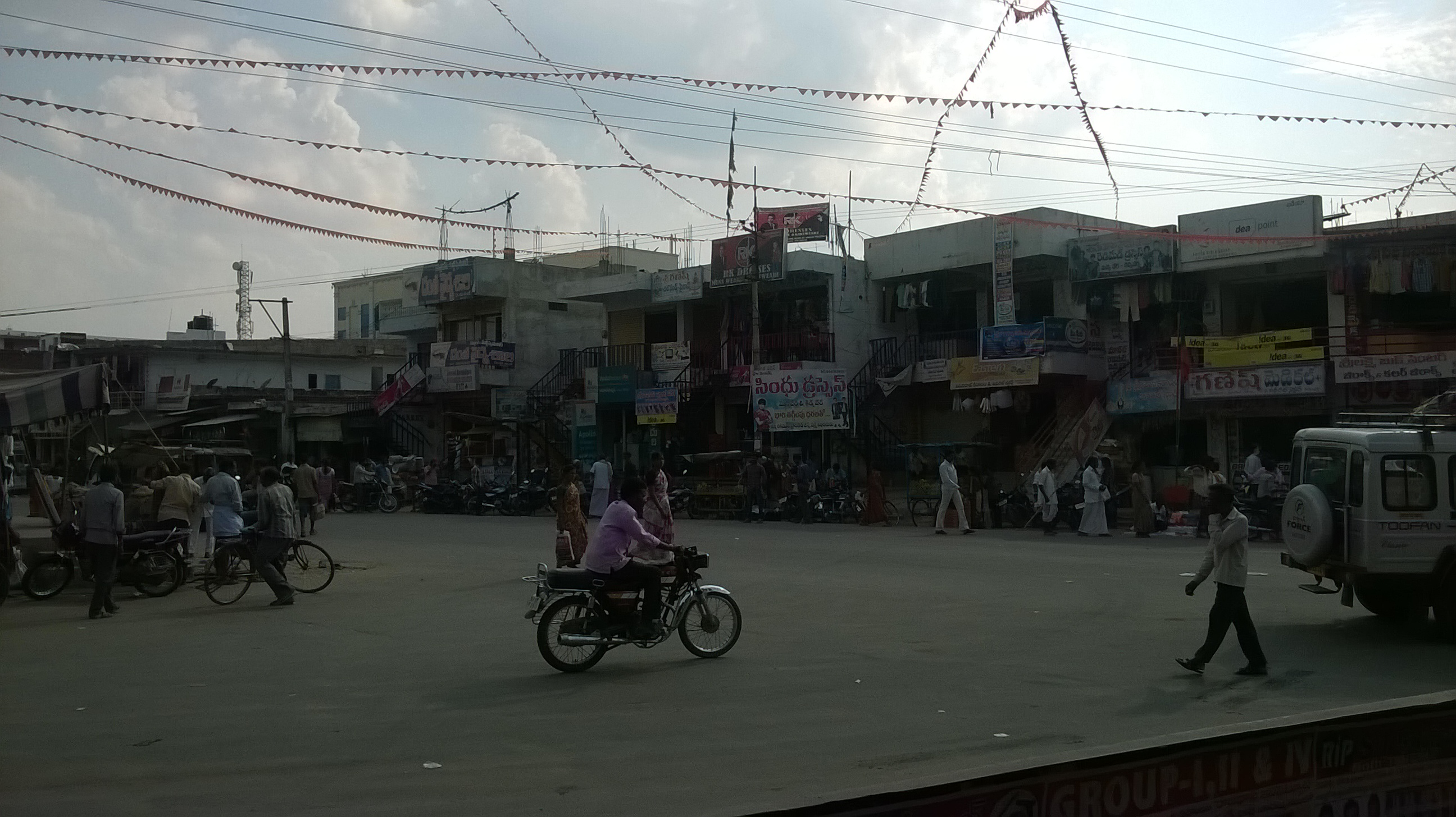 గ్రామ కూడలి